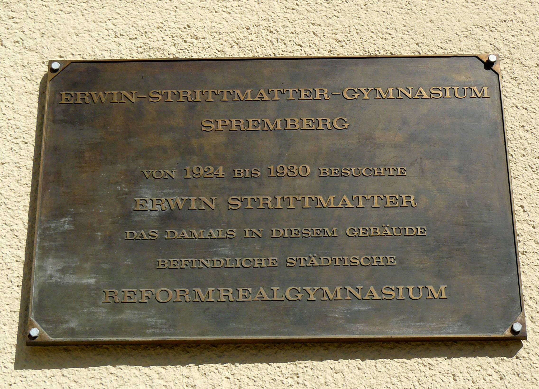 Gedenktafel am Erwin Strittmatter Gymnasium in Spremberg, Brandenburg, Deutschland